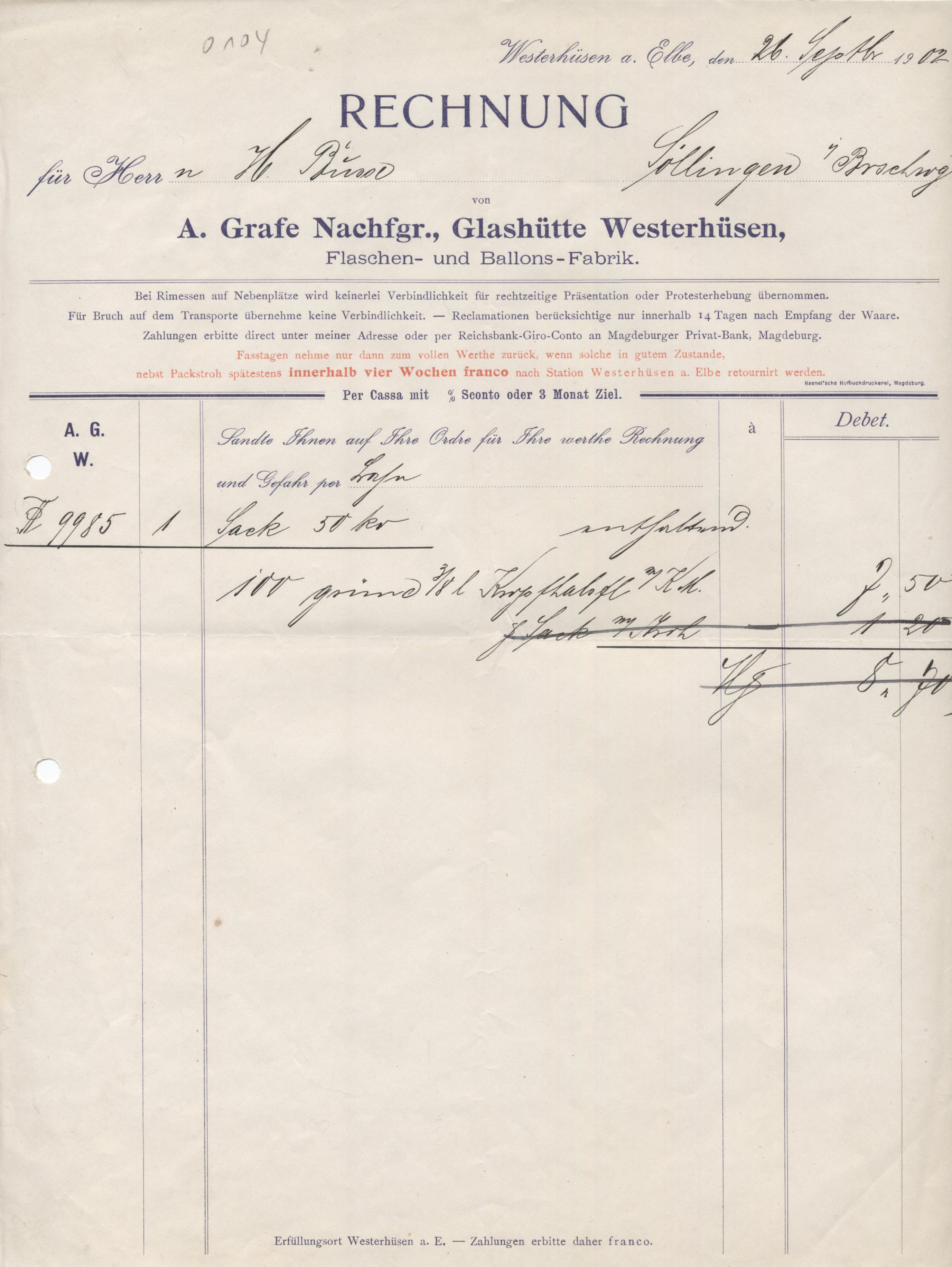 Rechnung der Firma A. Grafe Nachfgr., Glashütte Westerhüsen